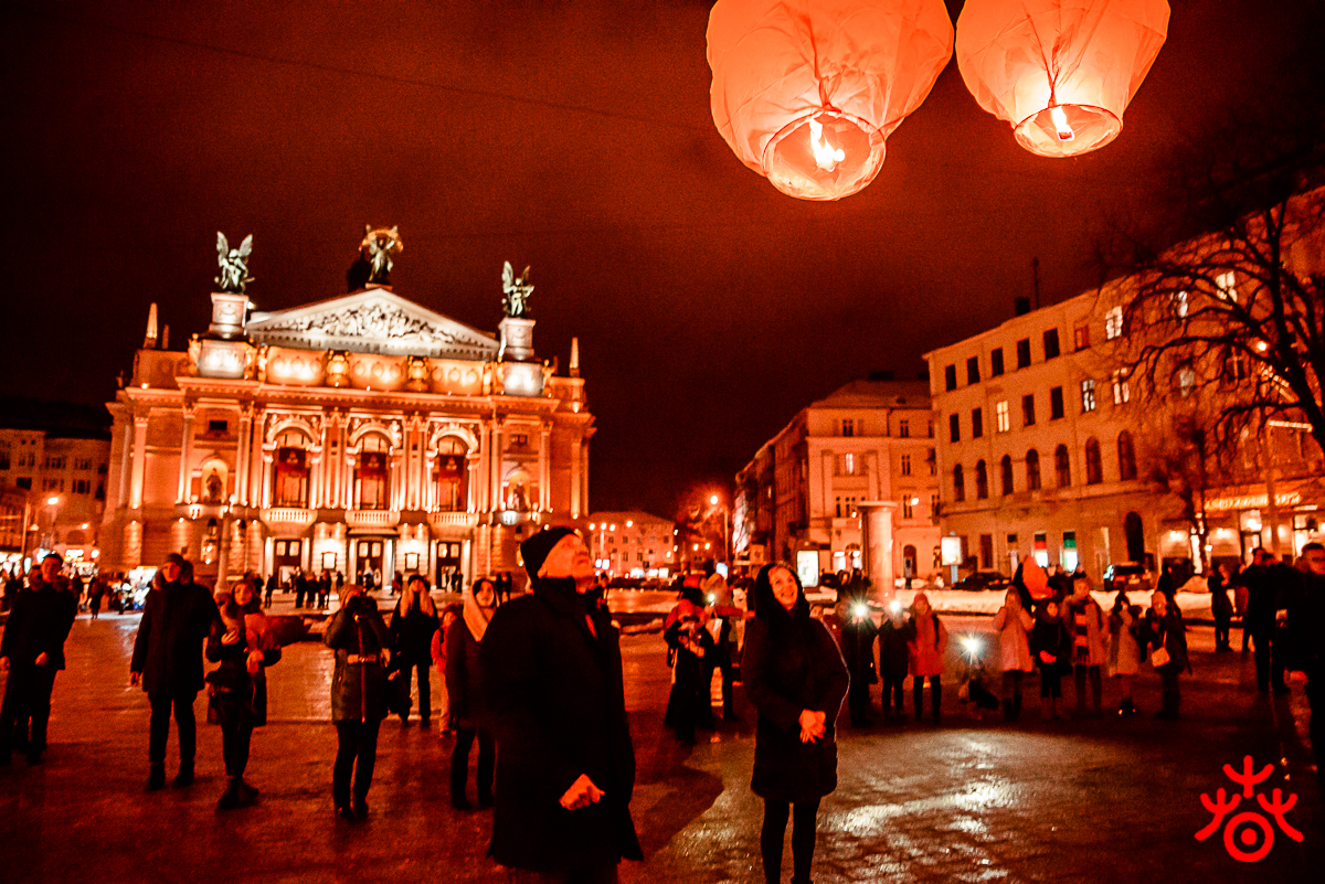 фестиваль